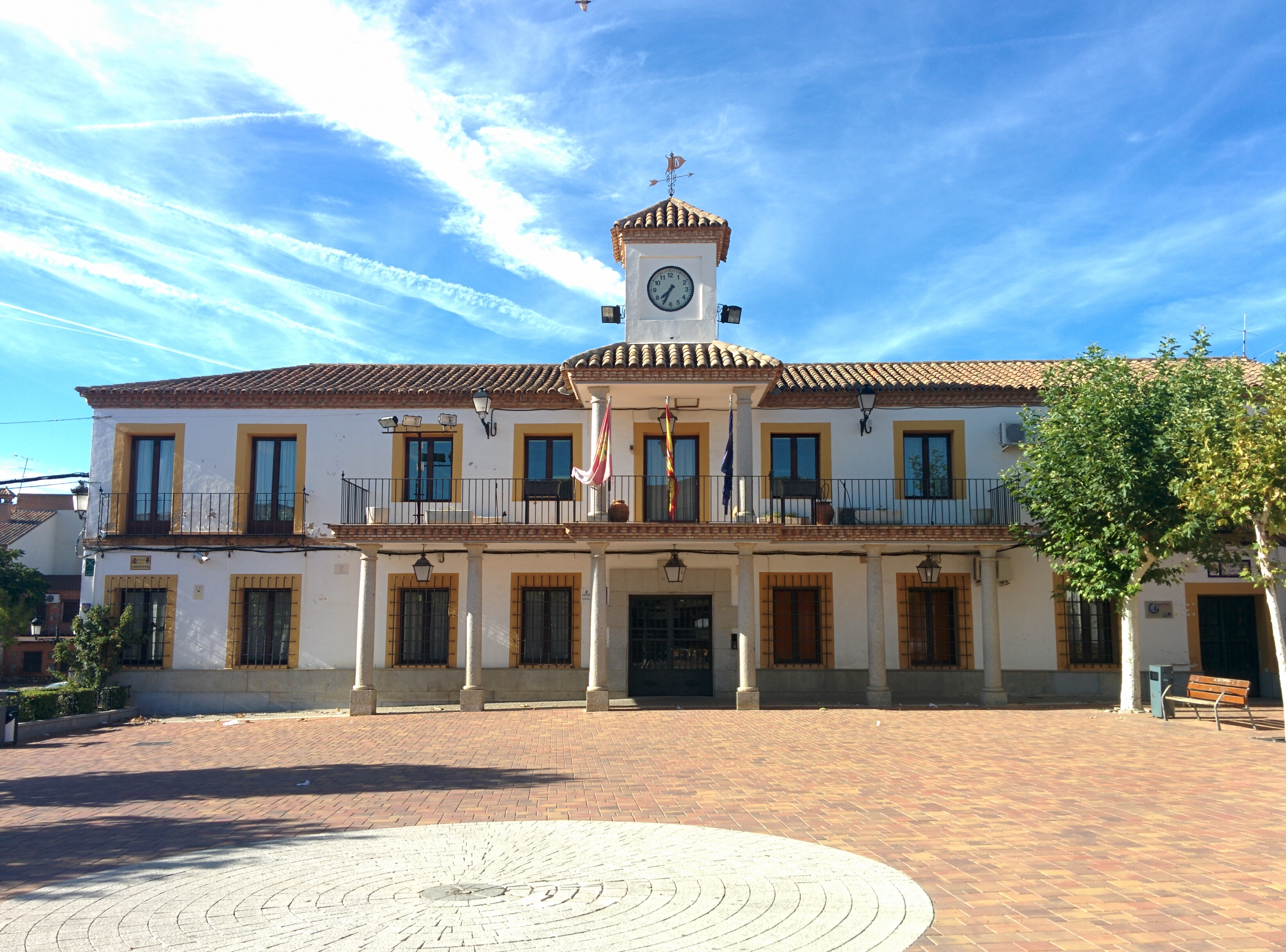 Casa consistorial de Nambroca (Toledo, España).